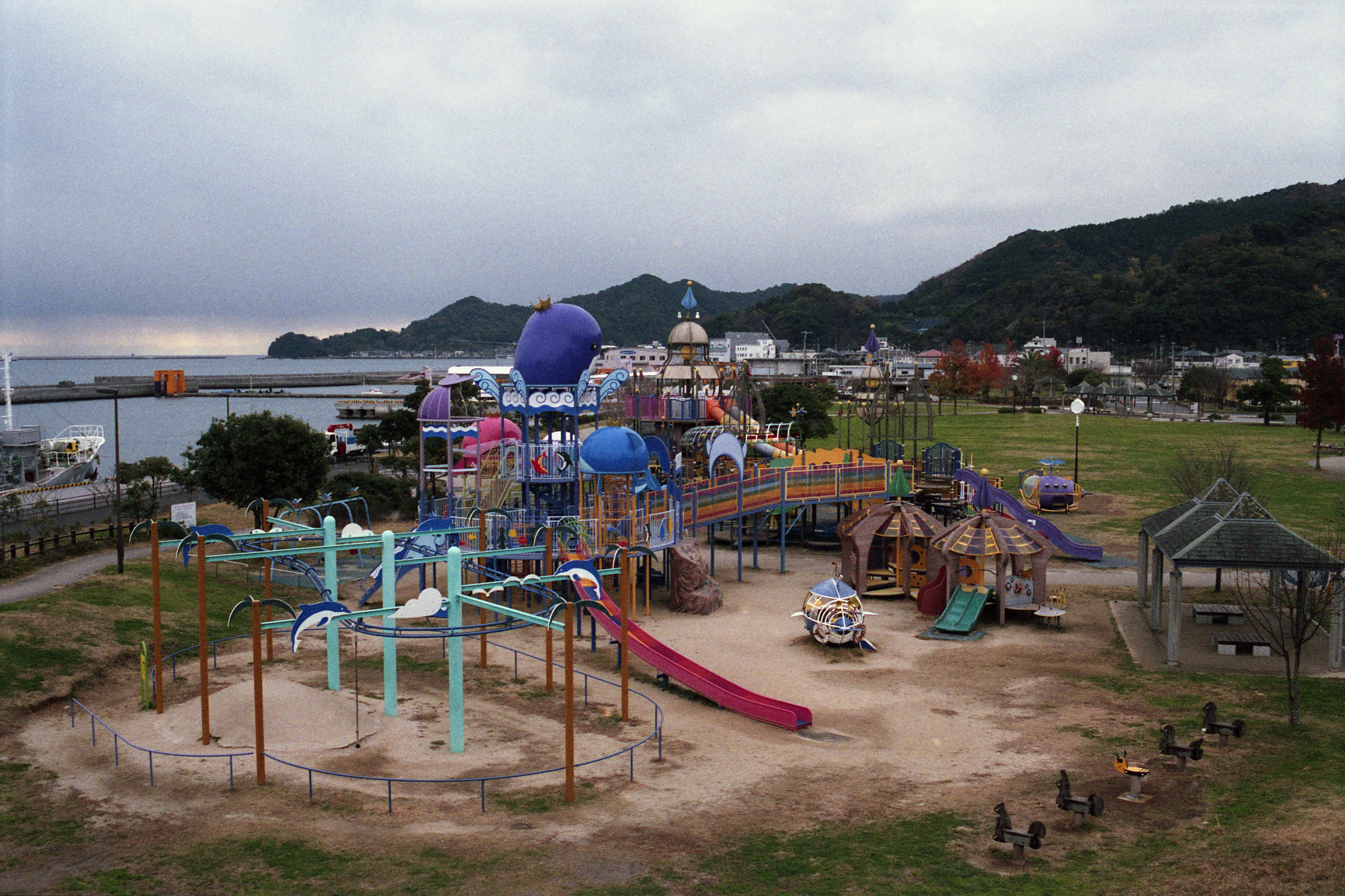 Chuomachi, Tsukumi, Oita Prefecture 879-2441, Japan